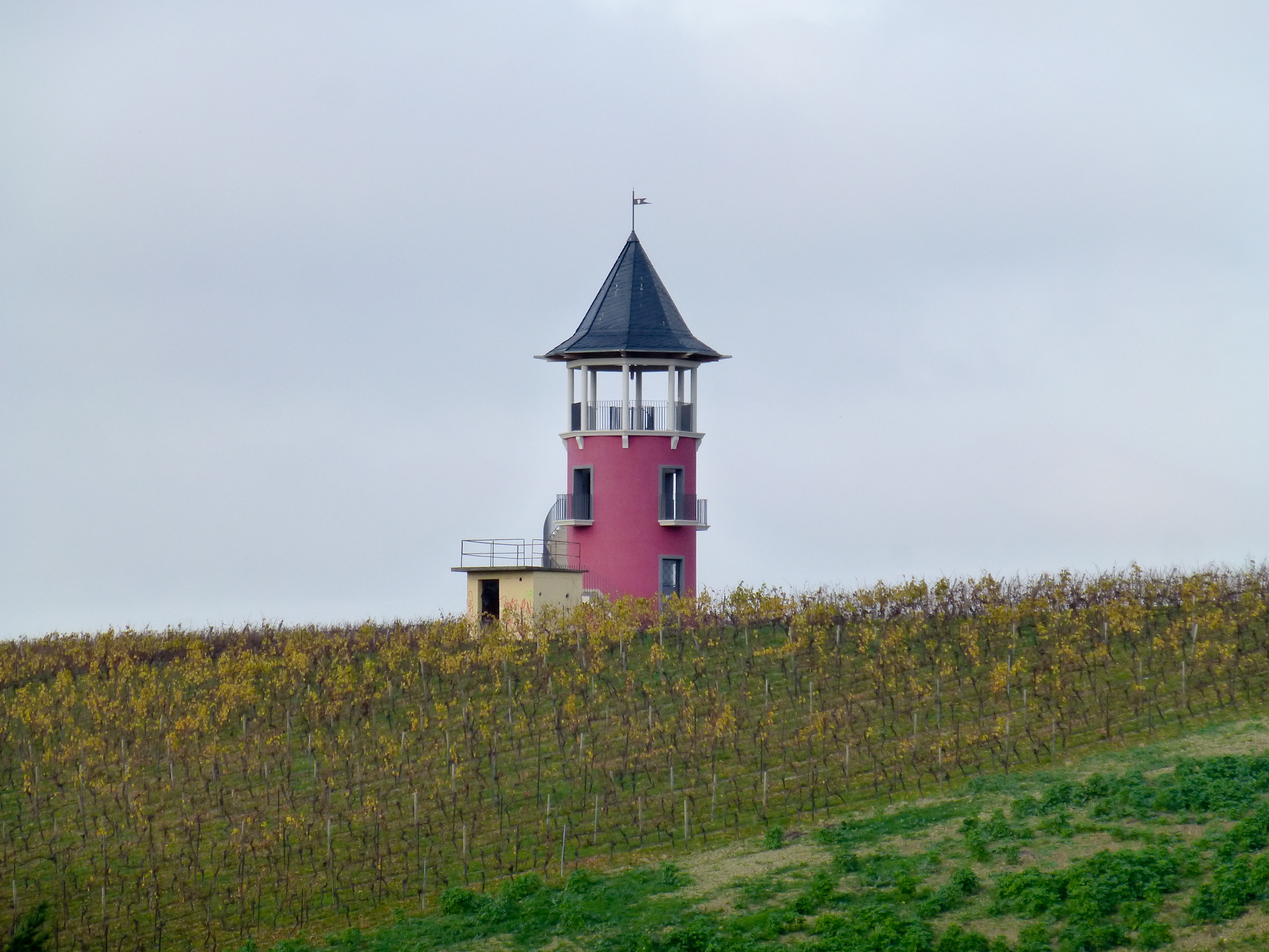 Burgunderturm in Wörrstadt